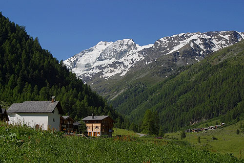 Gruben im Turtmanntal